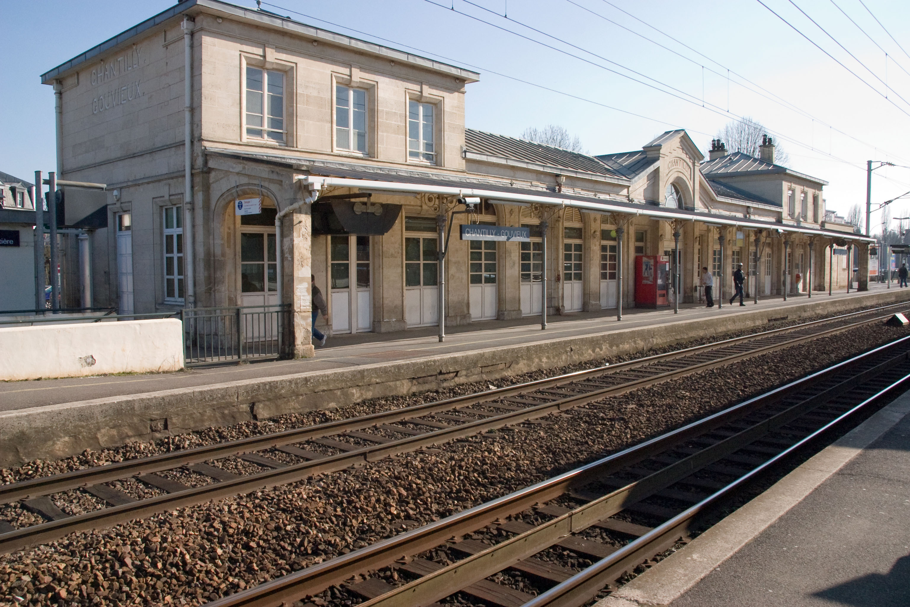 Gare de Chantilly - Gouvieux, Chantilly, département de l'Oise (France)